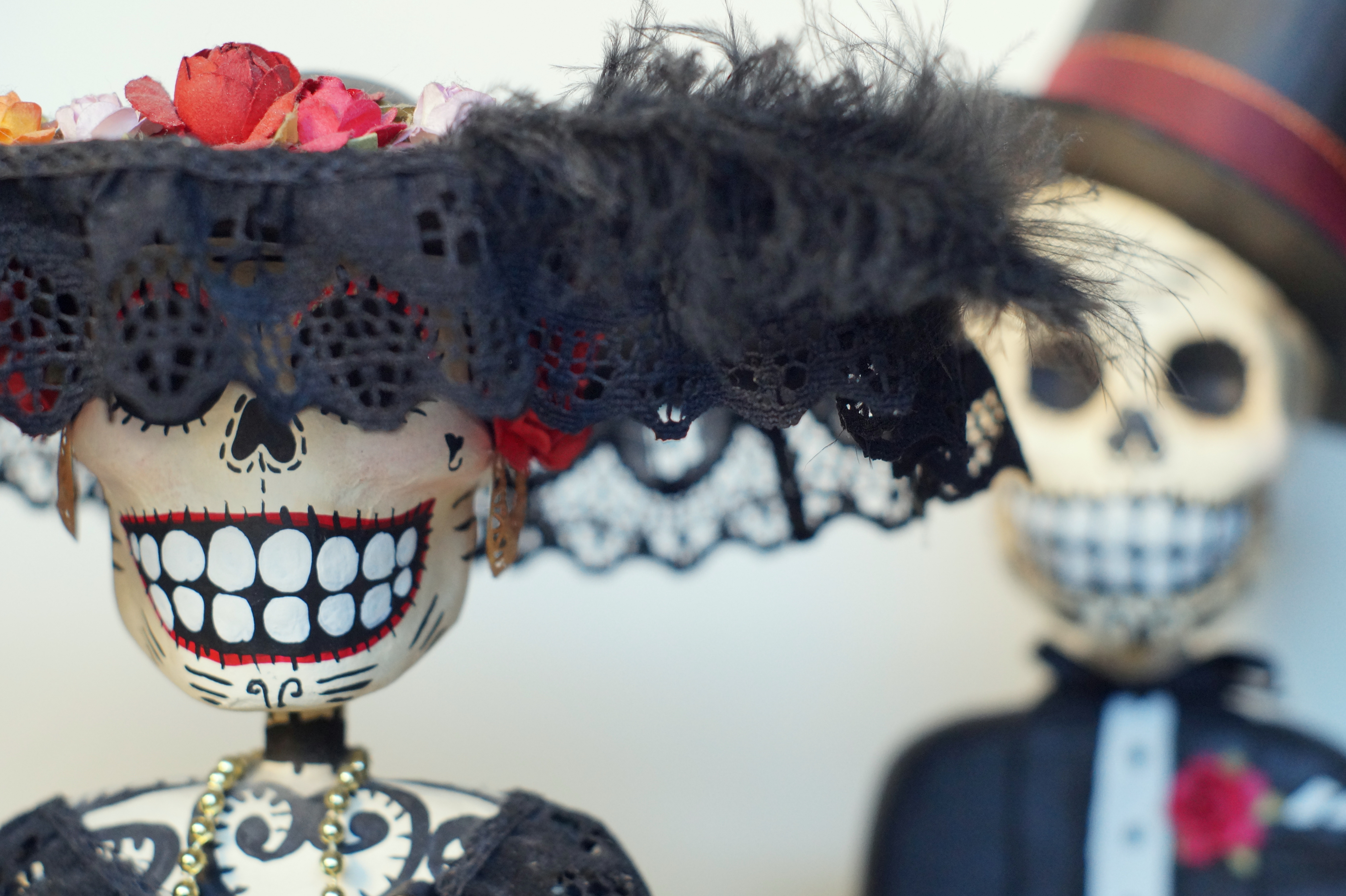 Estas artesanías de cartonería, compradas en la tienda del Museo de Arte Popular de México en agosto de 2009, son una interpretación contemporánea del personaje de La Catrina con, en segundo término, su versión masculina.